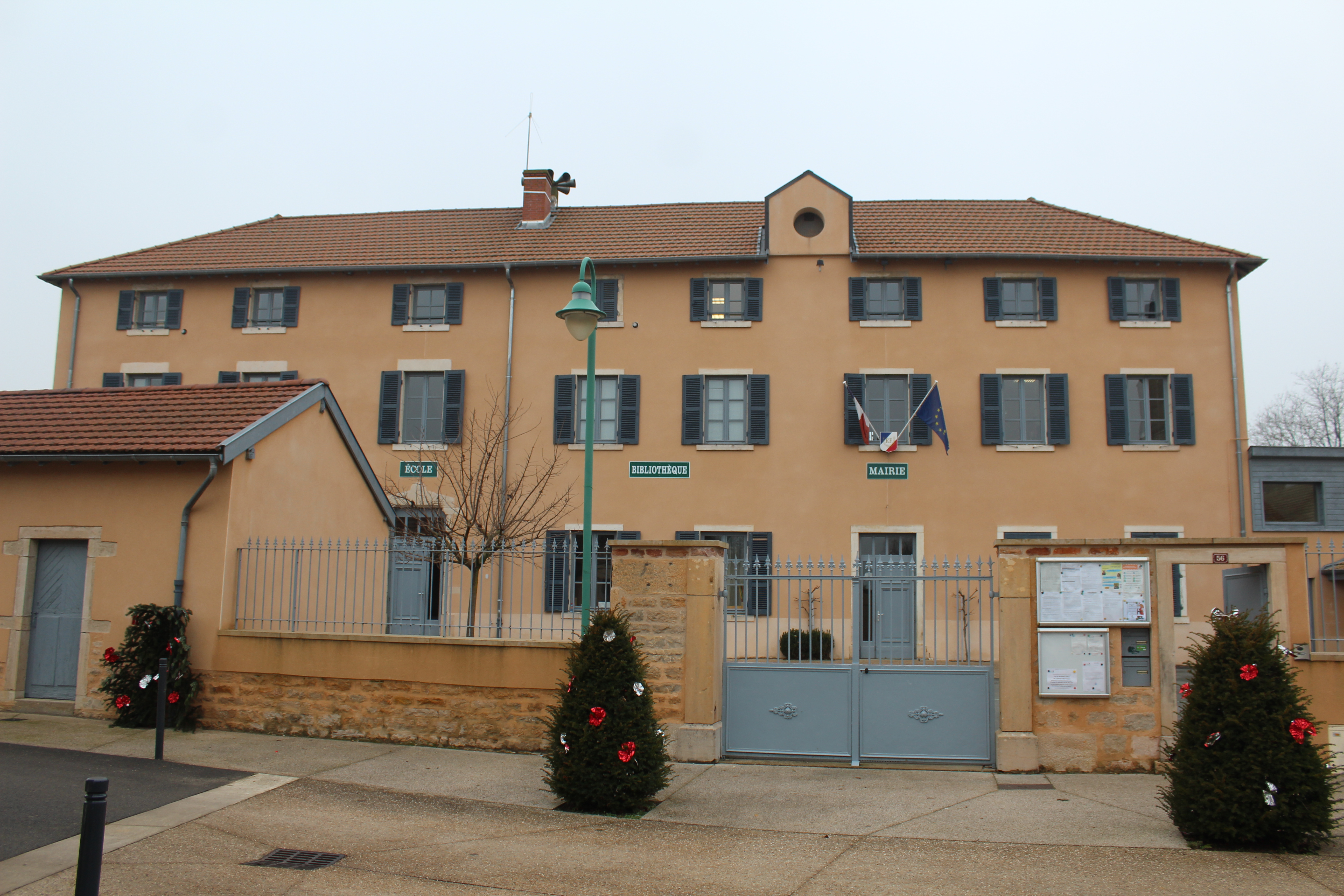 Mairie de Garnerans.